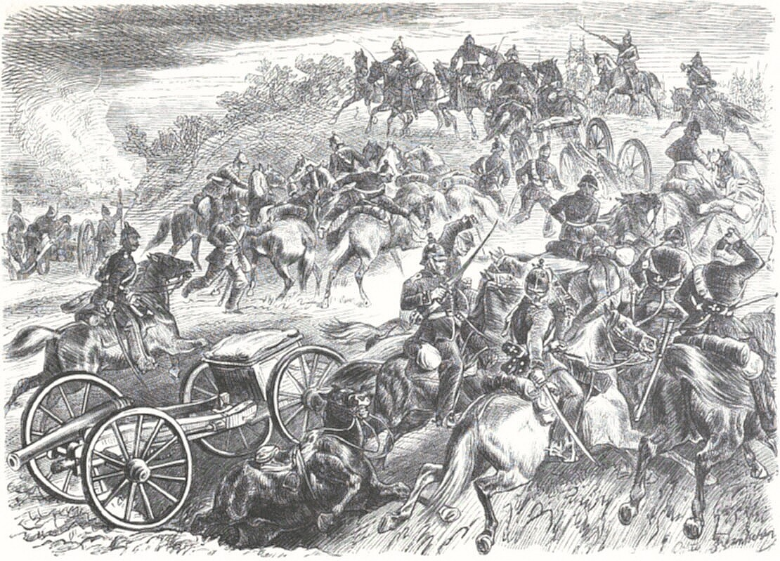 Artilleriegefecht bei Gerchsheim am 25. Juli 1866